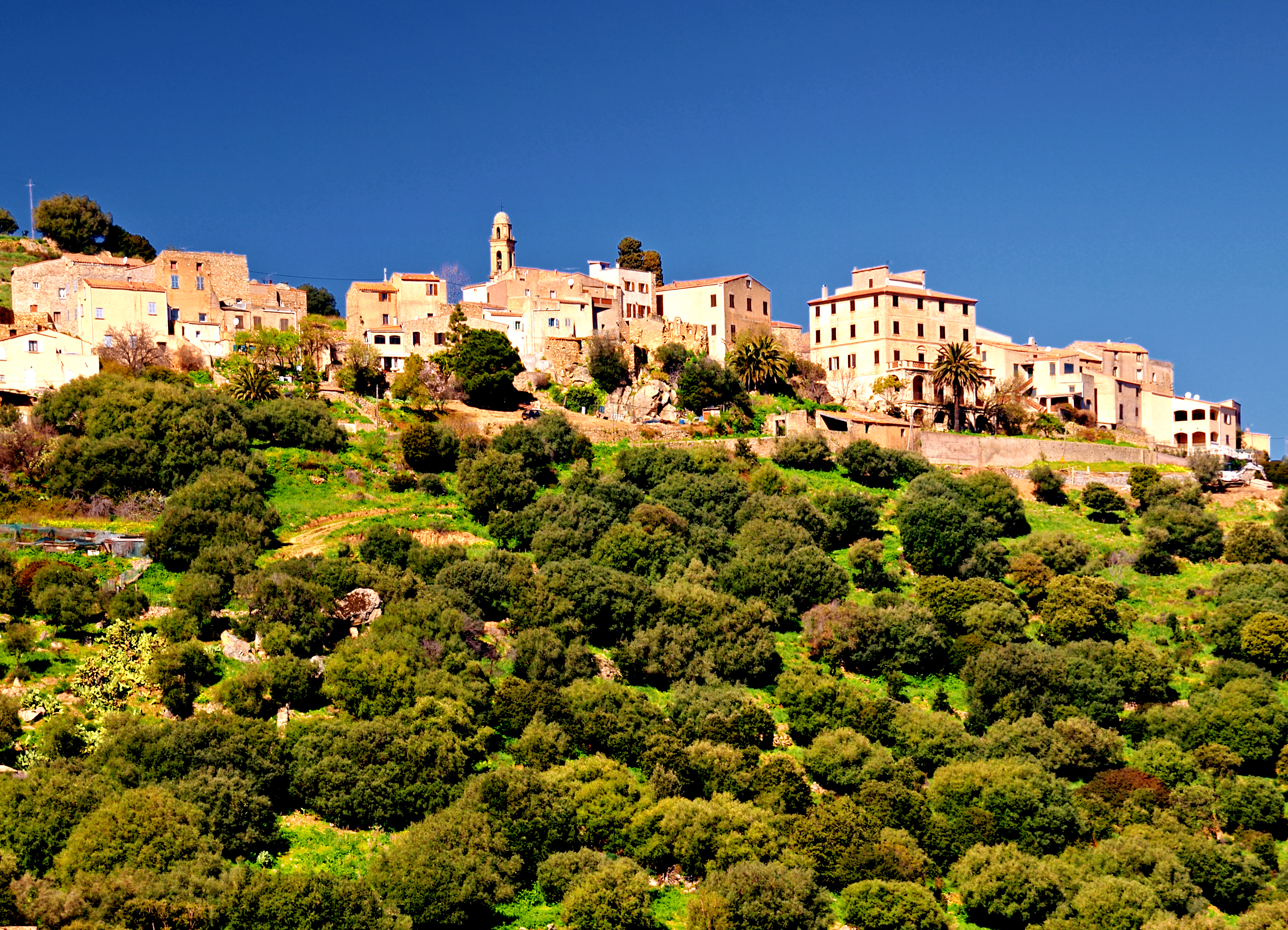 Santa-Reparata-di-Balagna (Corsica) - Village d'Occiglioni